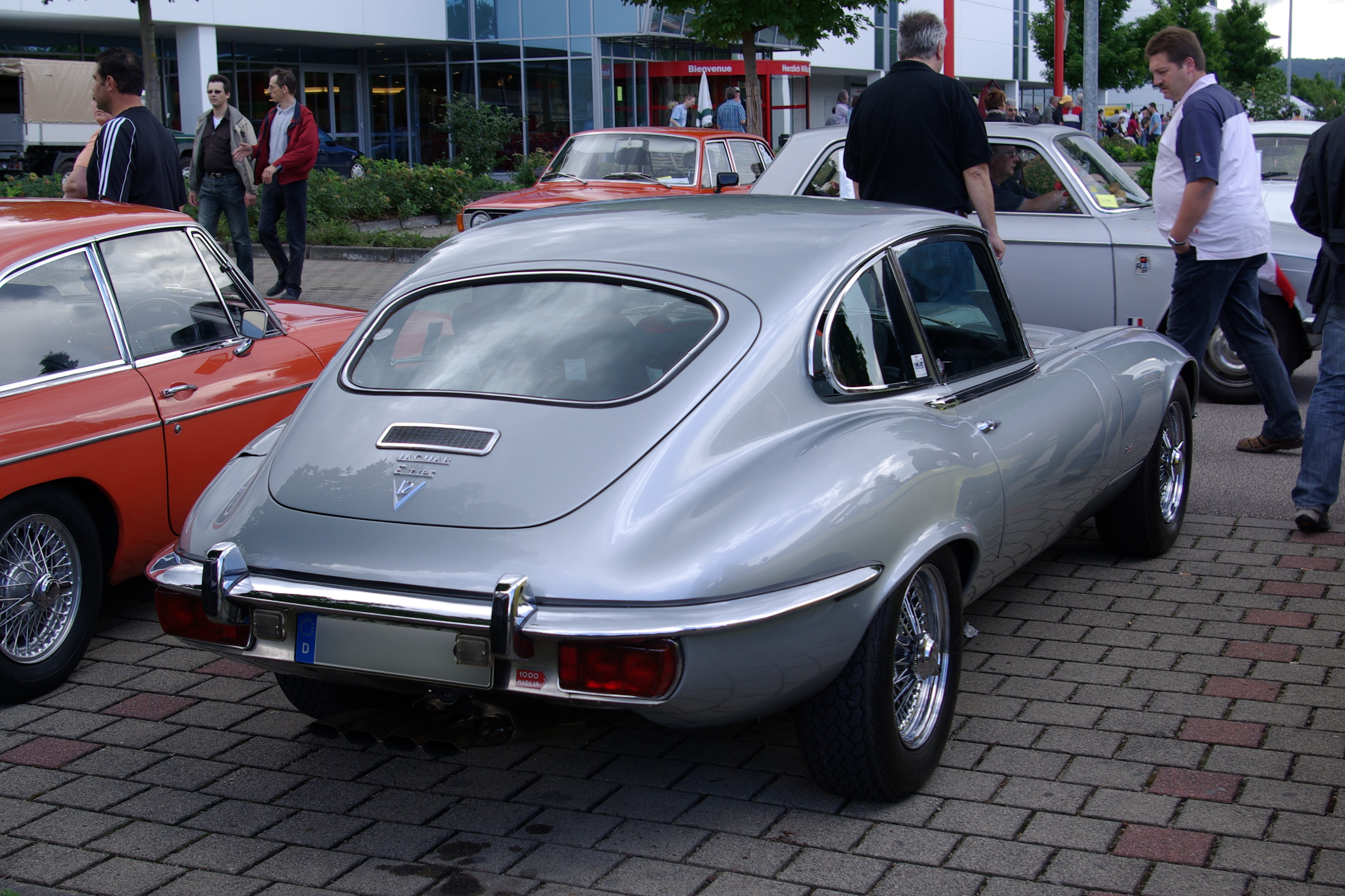 Jaguar E-Type Baujahr 1972 Leistung 272 PS 12 Zylinder